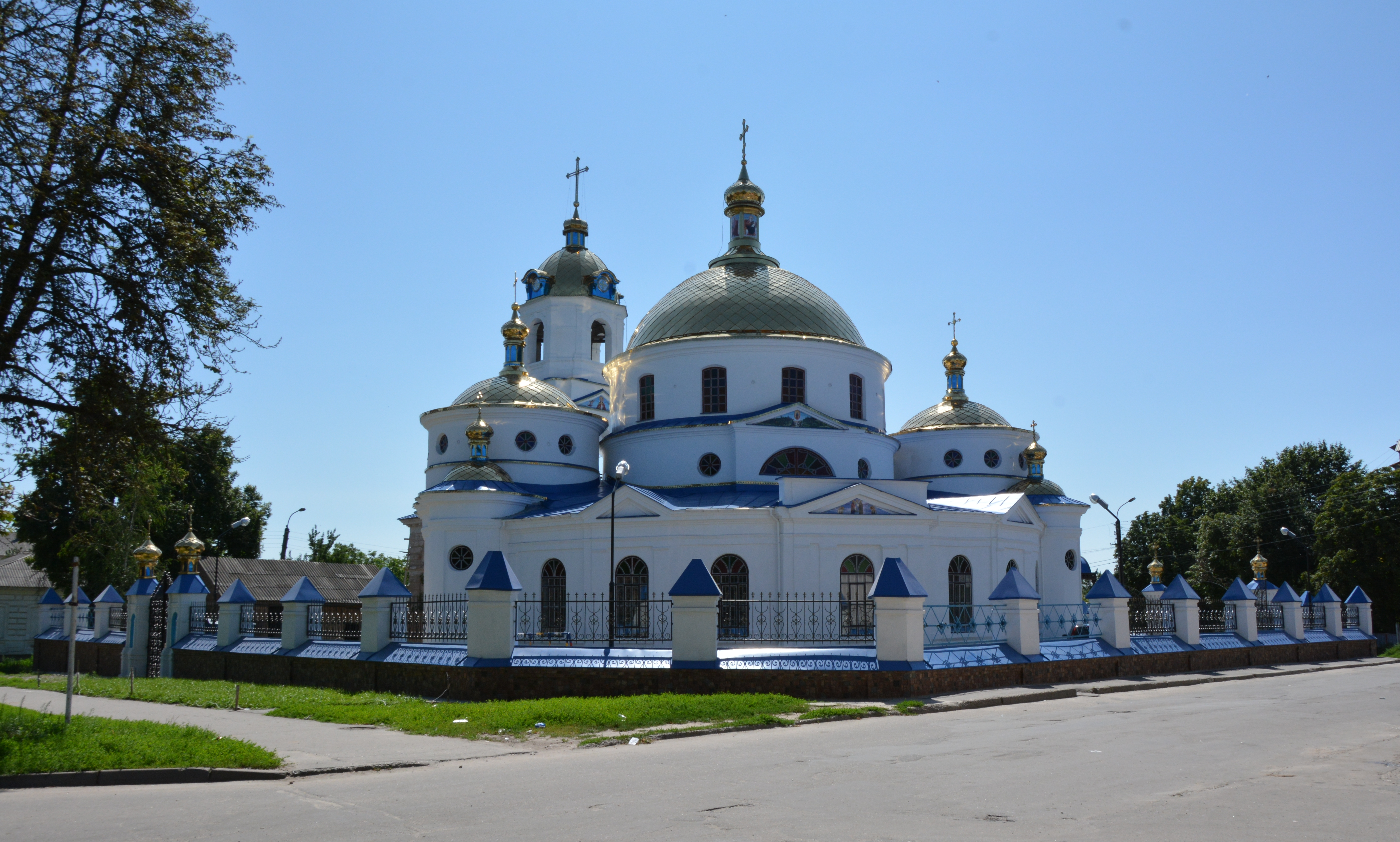 Вознесенська церква (мур.), Ромни, вул. Соборна, 16